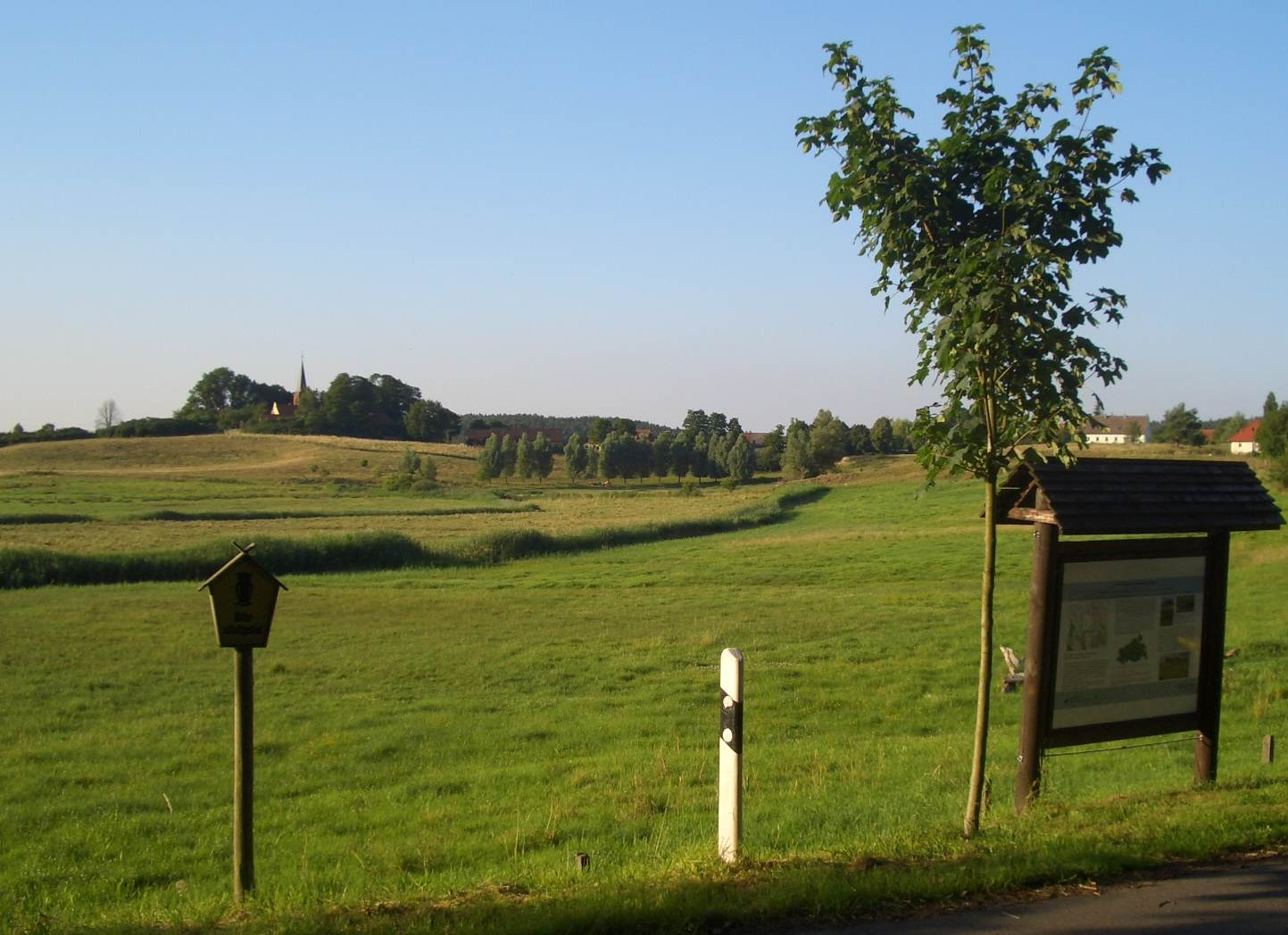 Blick von Osten auf das Naturschutzgebiet Binnensalzwiese bei Sülten.